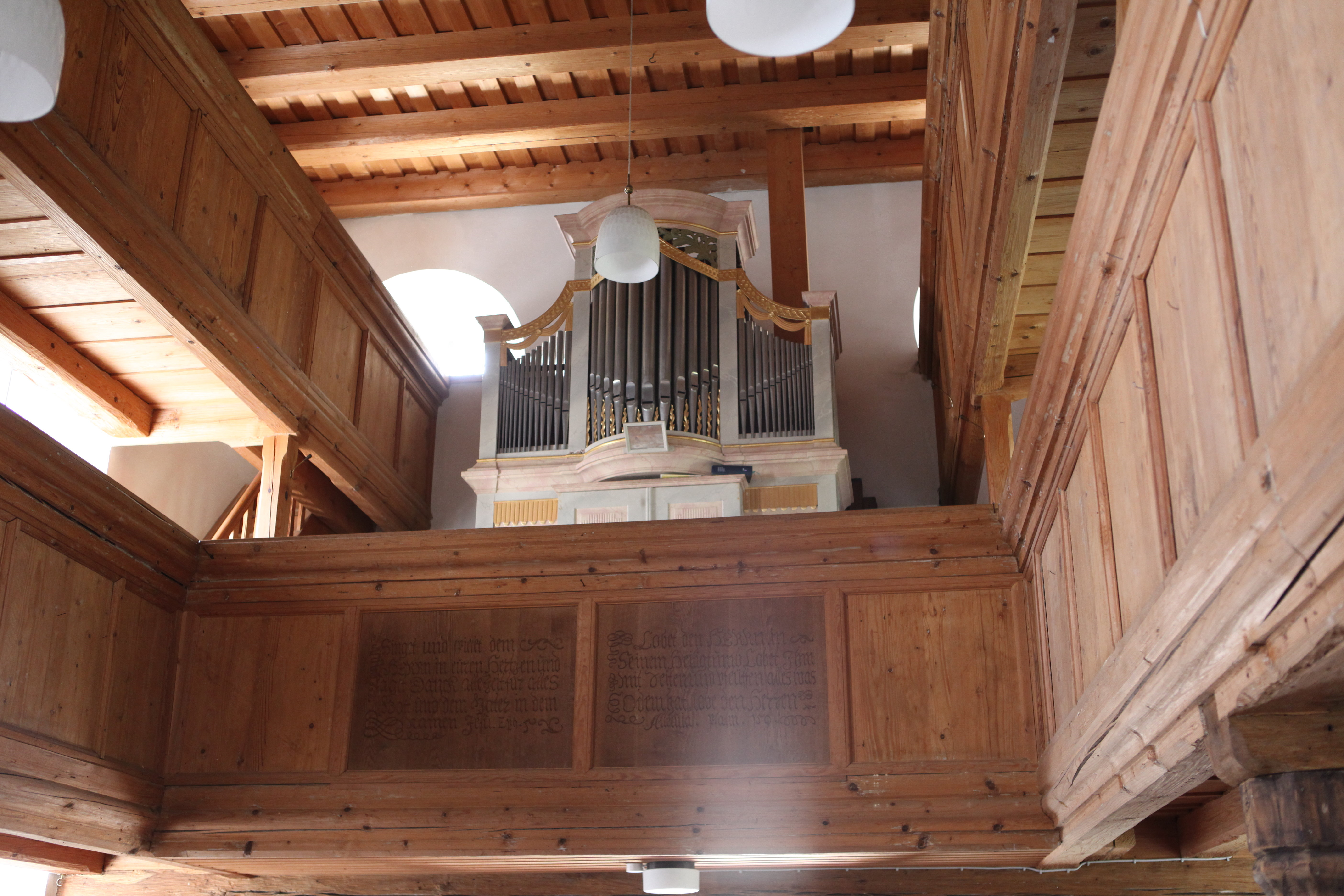 St. Jacobus, Herreth im Itzgrund